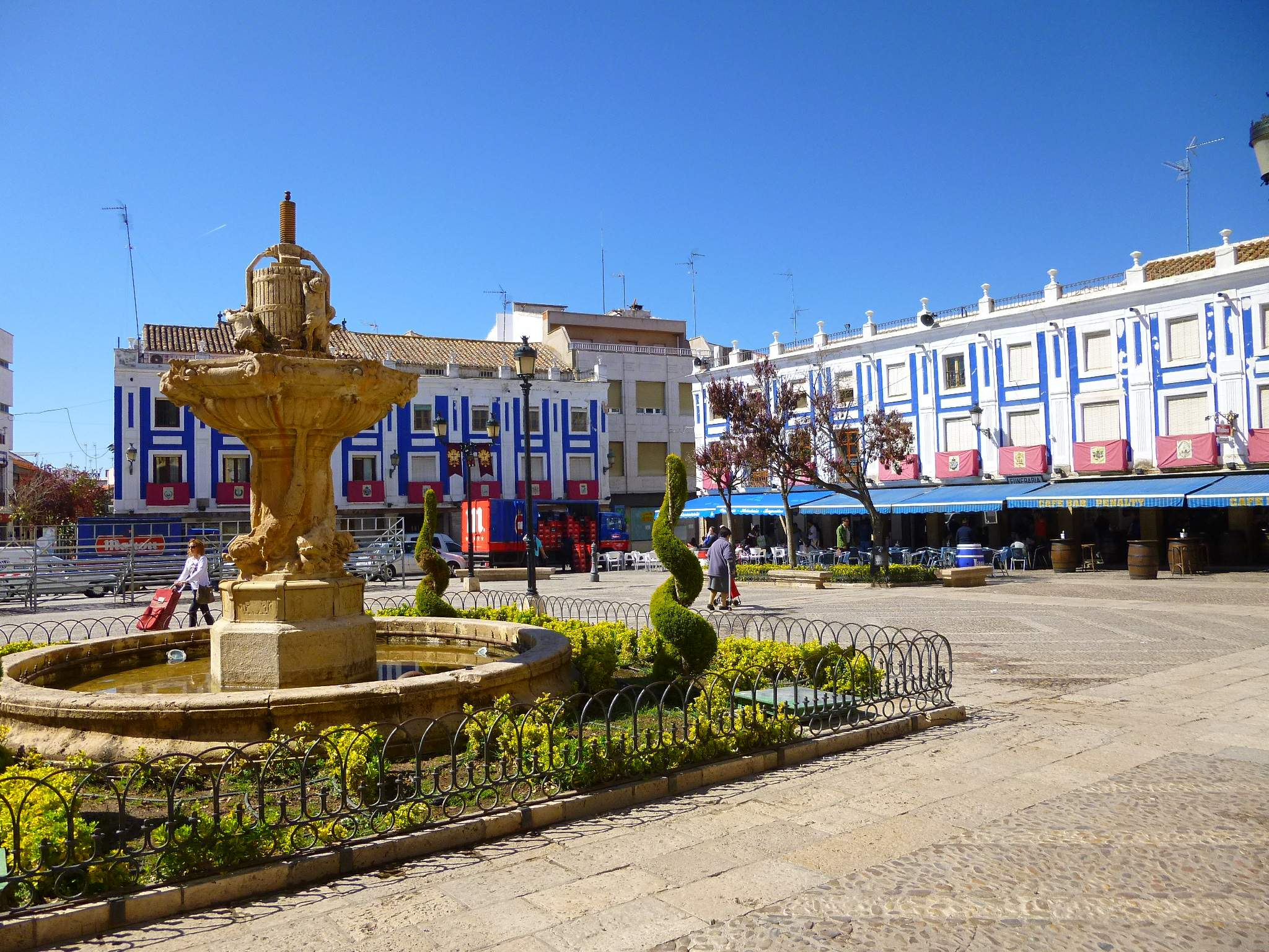 Plaza de España (Valdepeñas, Ciudad Real)